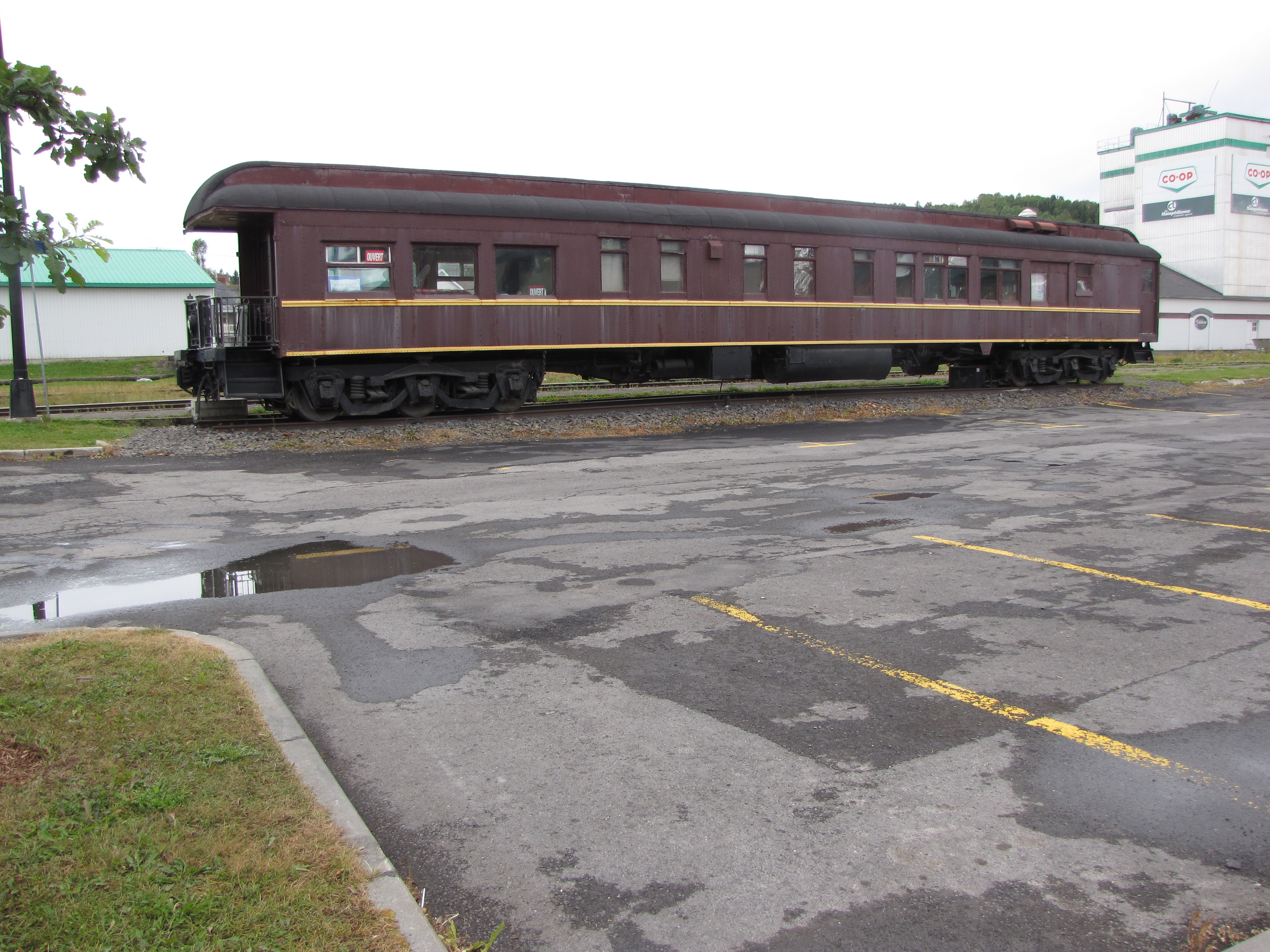 WAGON PASSAGER À VISITER, AMQUI QC